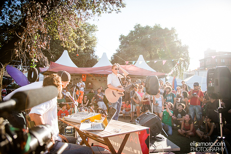 La Tempesta Gemella, evento dell'etichetta indipendente musicale italiana La Tempesta Dischi, Piazzale del Verano, Roma, 23-24 giugno 2014. This image contains digital watermarking or credits in the image itself. The usage of visible watermarks is discouraged. If a non-watermarked version of the image is available, please upload it under the same file name and then remove this template. Ensure that removed information is present in the image description page and replace this template with metadata from image or attribution metadata from licensed image . Caution: Before removing a watermark from a copyrighted image, please read the WMF's analysis of the legal ramifications of doing so, as well as Commons' proposed policy regarding watermarks. If the old version is still useful, for example if removing the watermark damages the image significantly, upload the new version under a different title so that both can be used. After uploading the non-watermarked version, replace this template with superseded|new filename|version without watermarks .